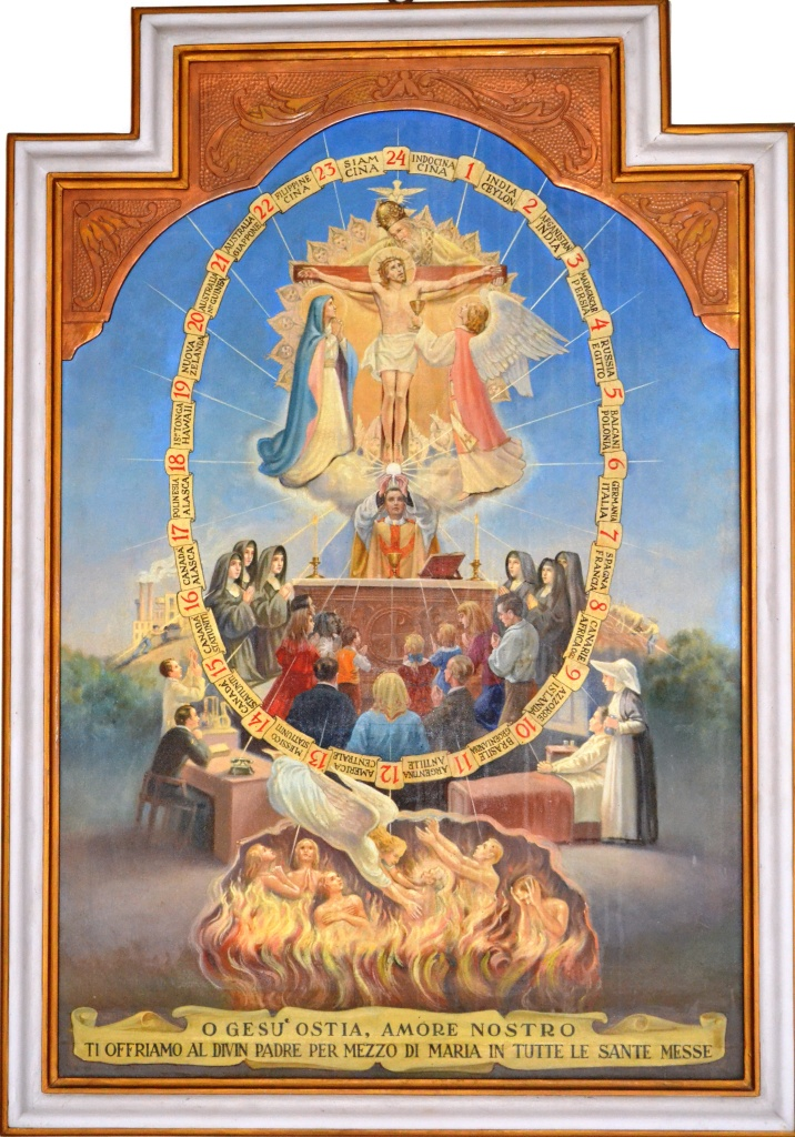 Symbol duchowości sióstr Misjonarek Chrystusa Wiecznego Kapłana